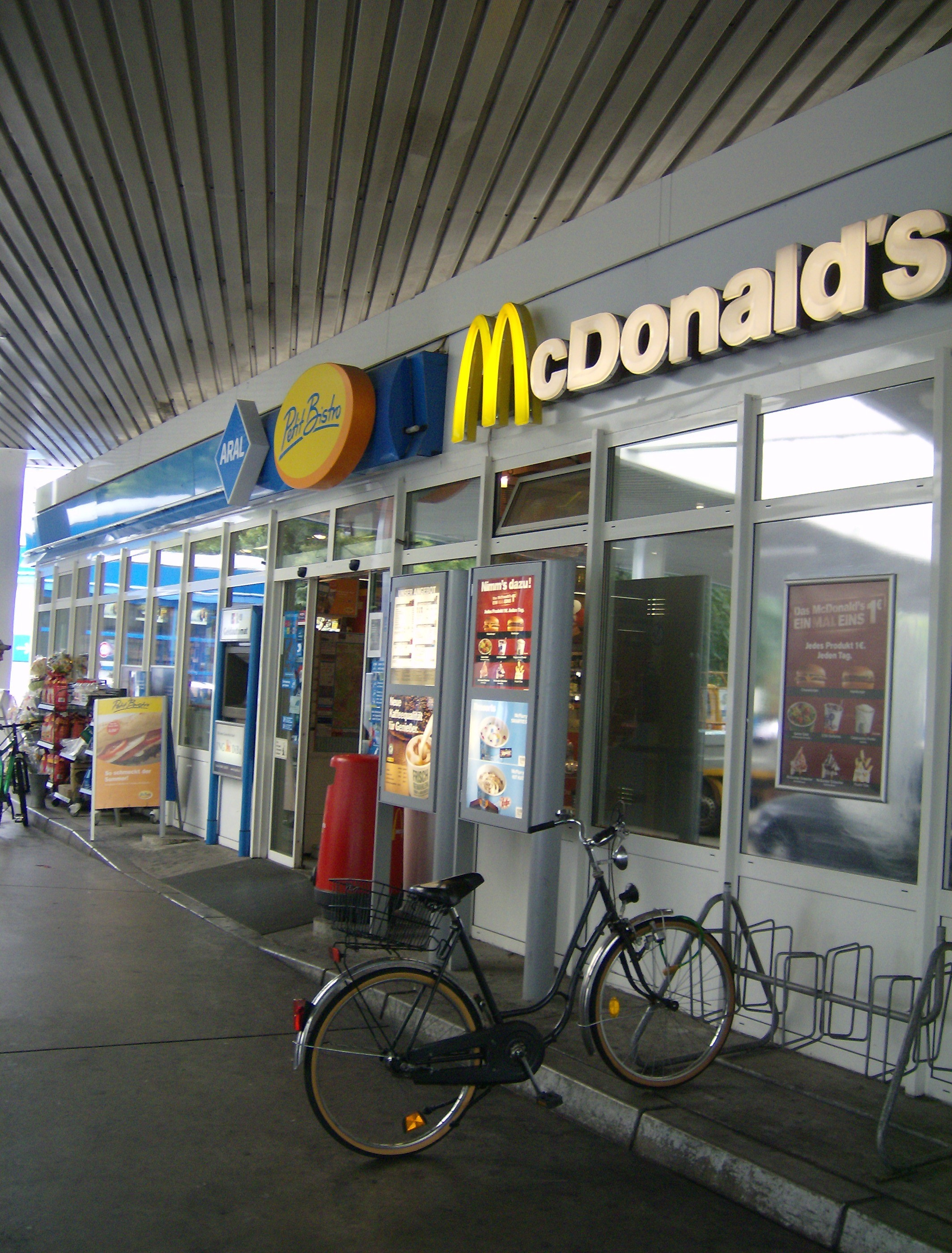 Das Bild zeigt die erste angebundene Filiale in Darmstadt